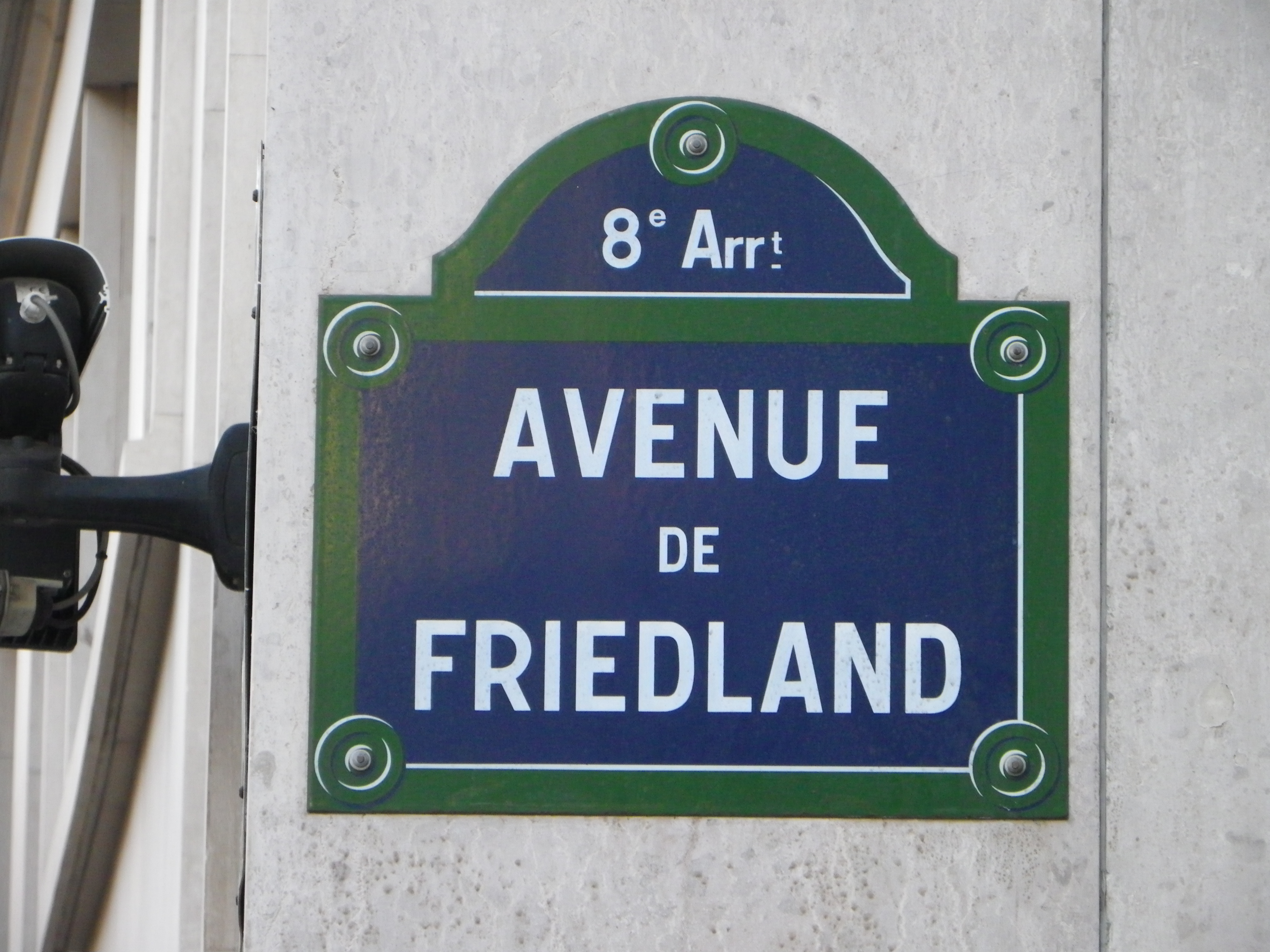 Plaque de l'avenue de Friedland à Paris